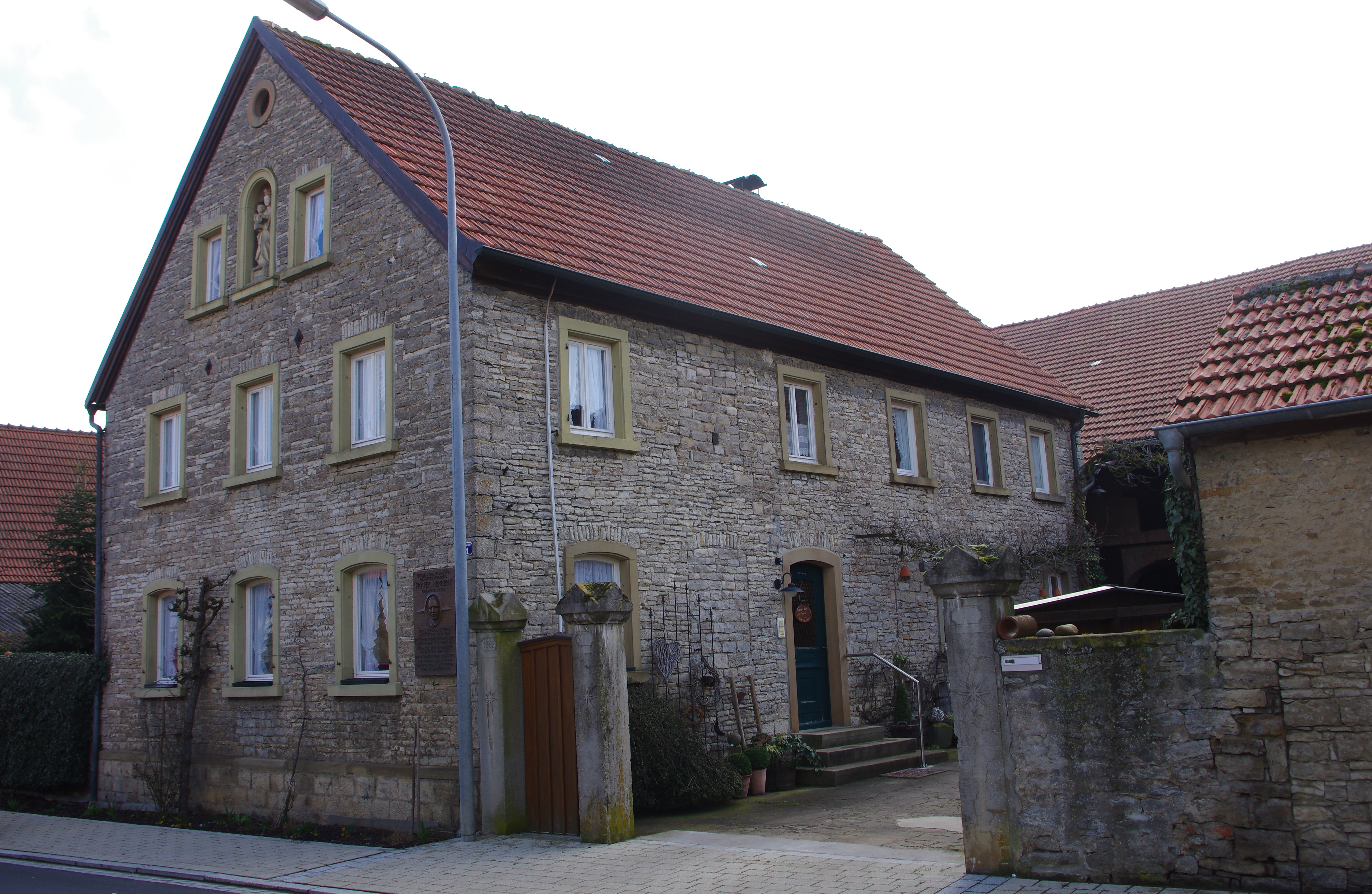 Lindacher Straße 1, Kolitzheim, Unterfranken, Deutschland